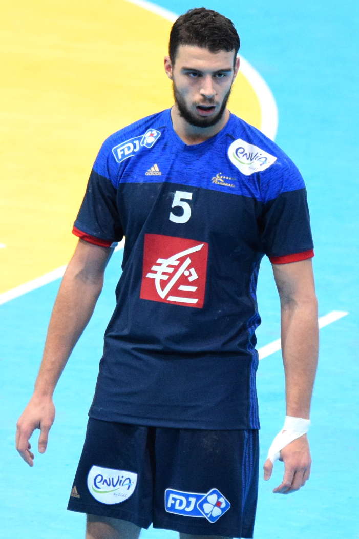 Le 10 janvier 2016 lors du match France / Danemark durant la Golden League à l'AccorHotels Arena (Paris).